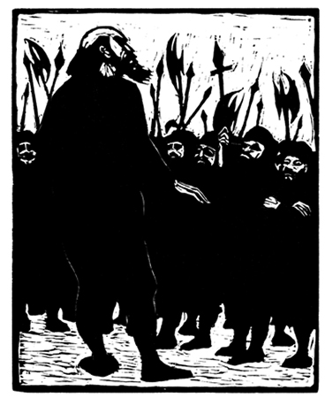 Print